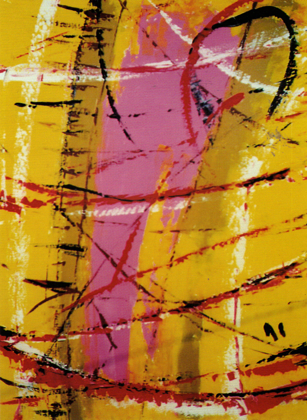 opera pittorica realizzata da Angelo Caputo durante il suo periodo astratto-informale